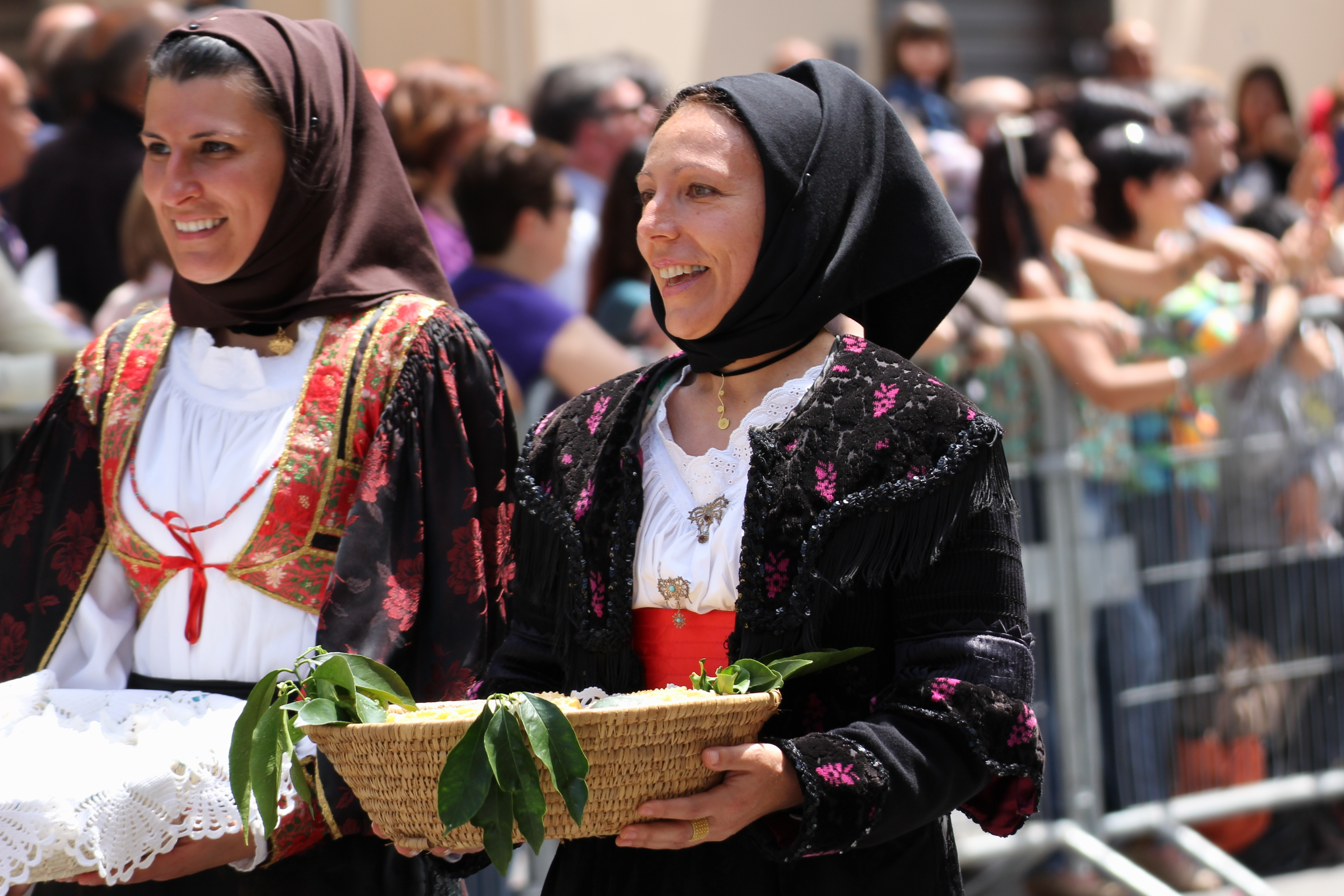 Costume tradizionale